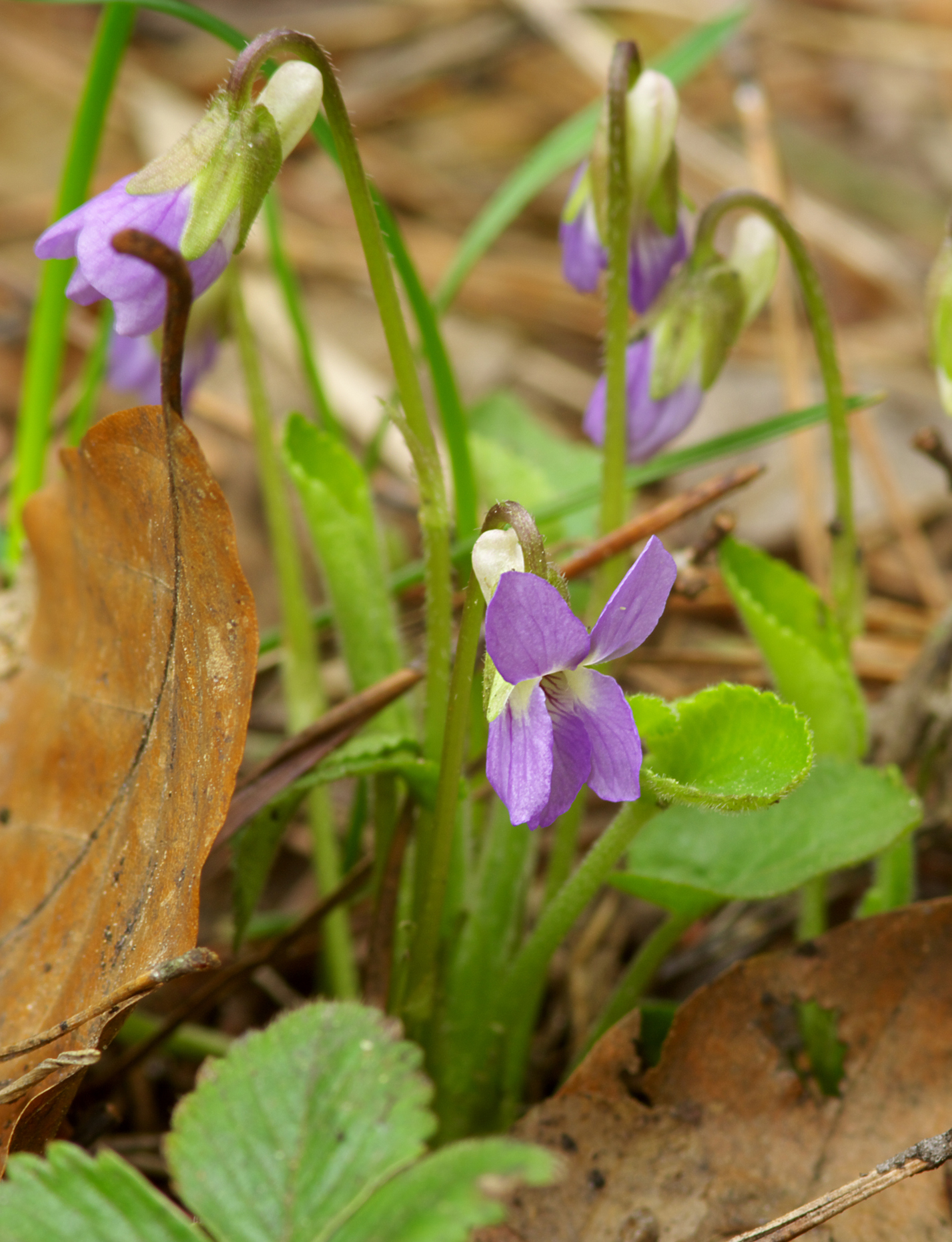 Fiołek kosmaty (Viola hirta)